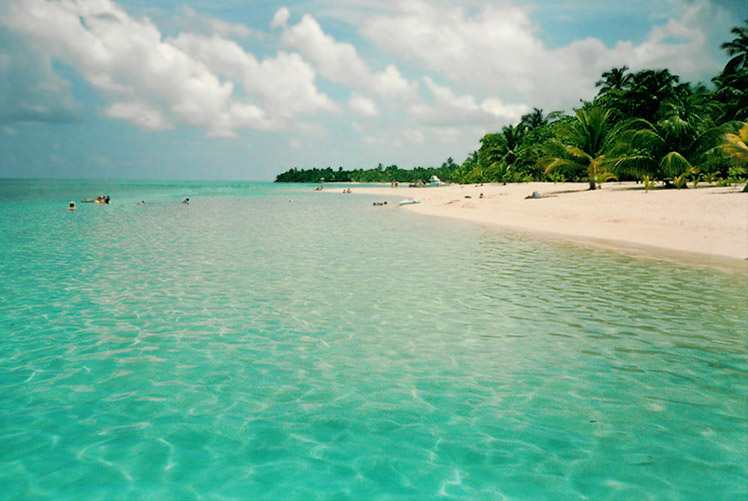 West Bay, Roatan, Islas de la Bahia - Honduras, 1995